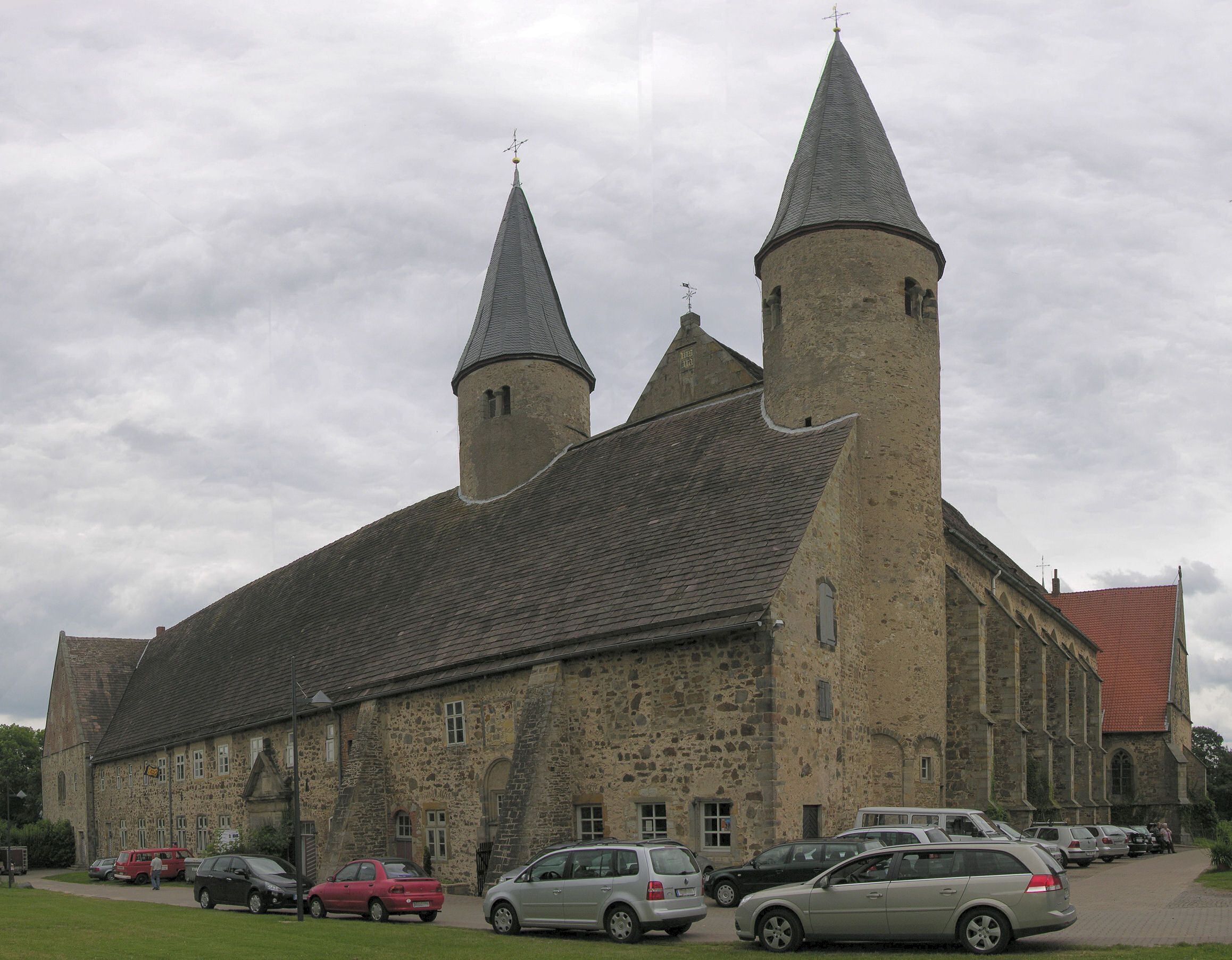 Kloster Möllenbeck in Rinteln